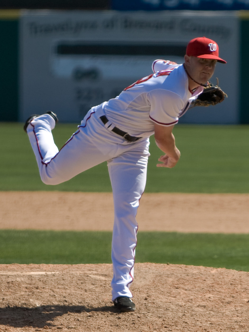 Drew Storen